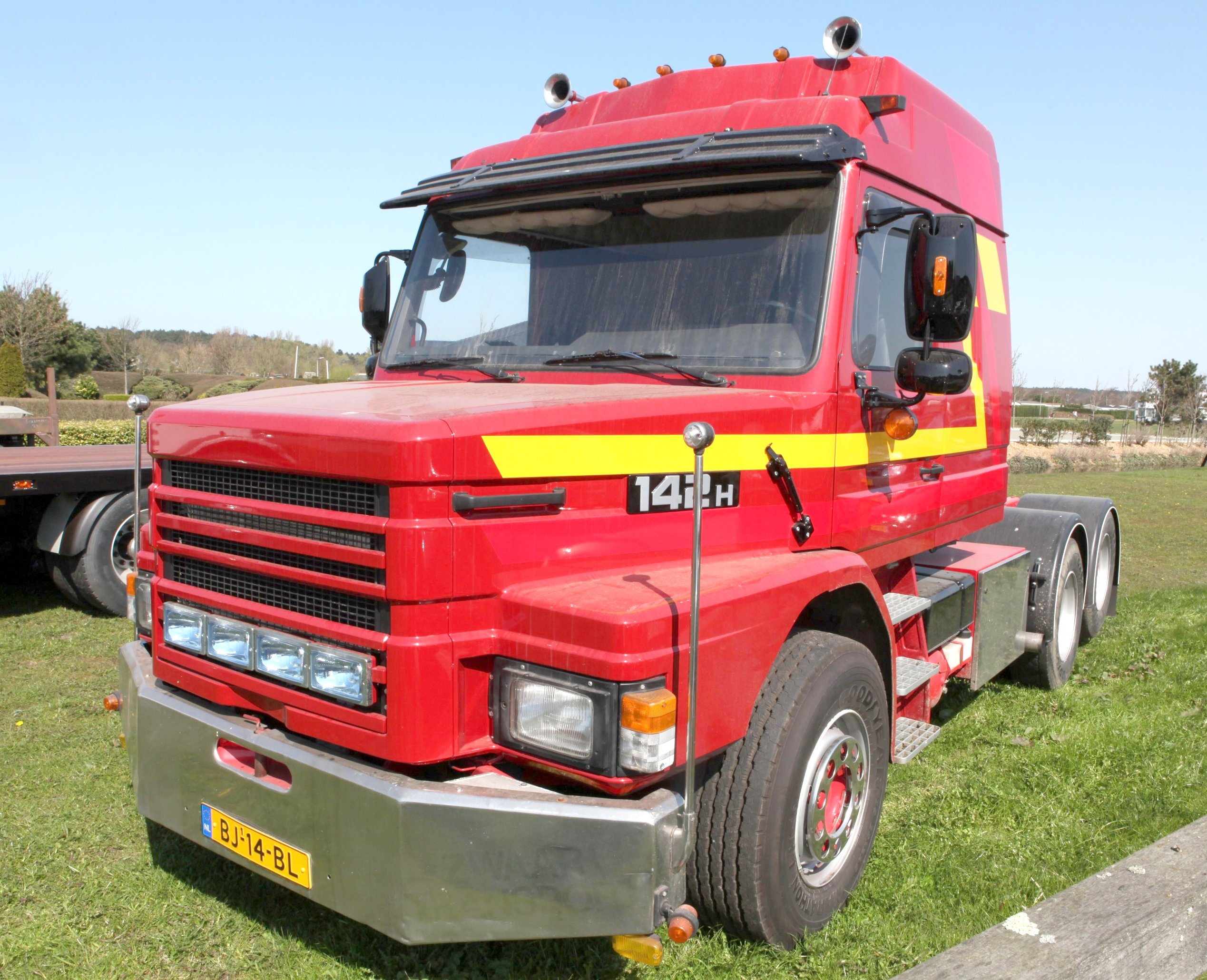 Scania 142 H.